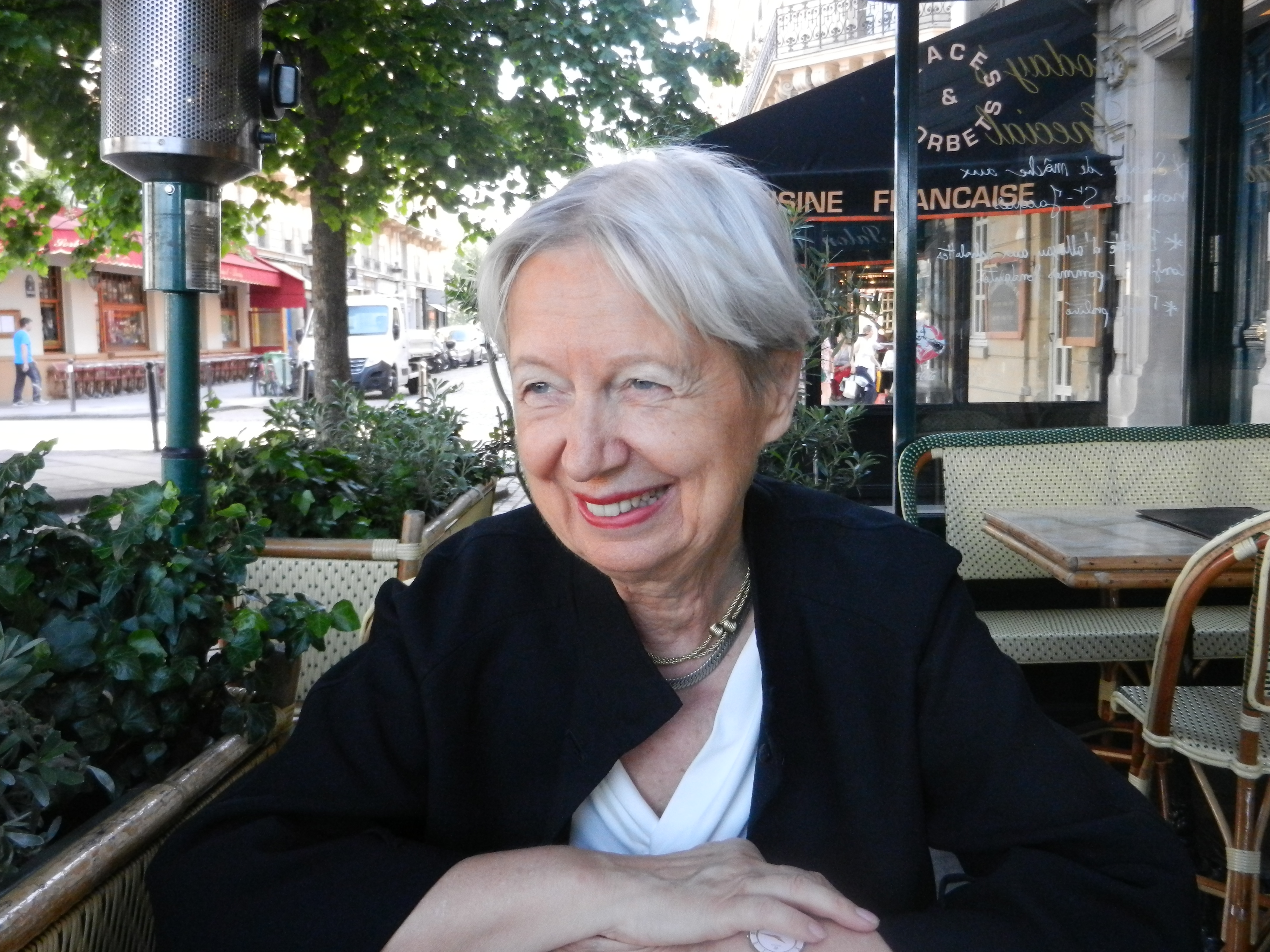 Gesichtsaufnahme Gespräch